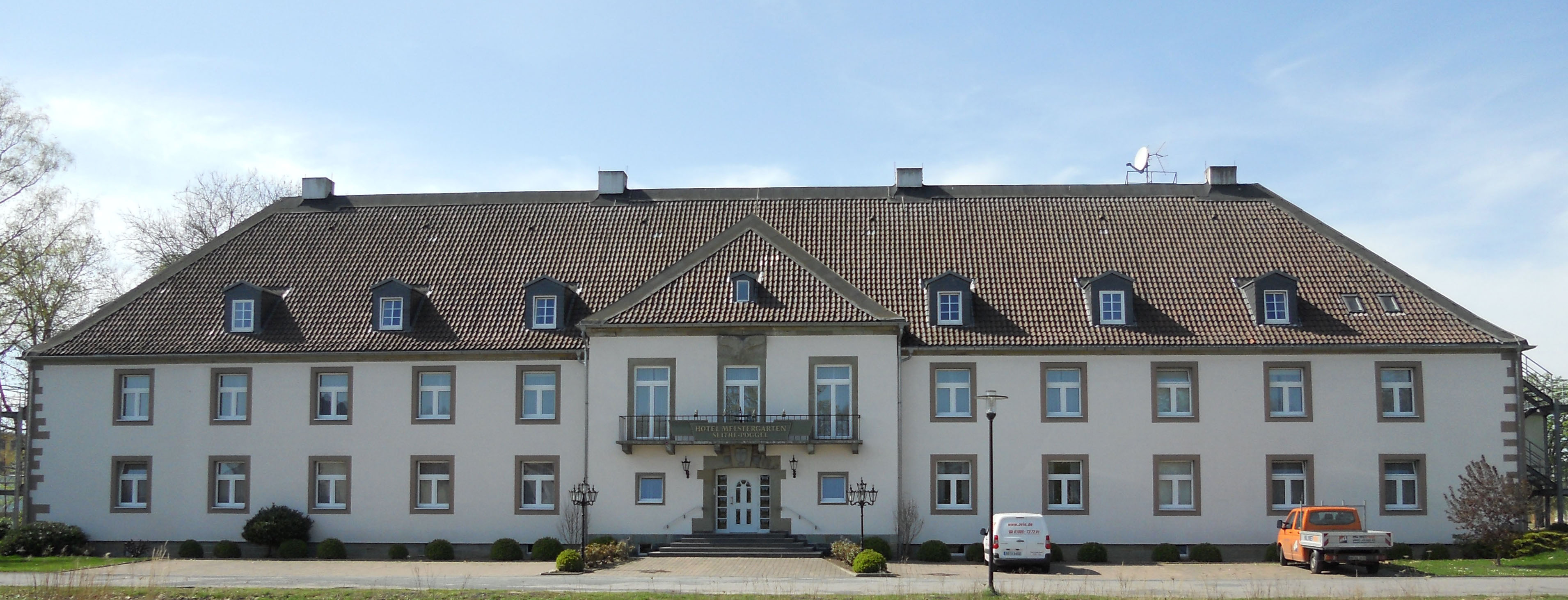 Kasernengebäude des Fliegerhorstes, wurde erst durch die deutsche Luftwaffe, dann durch die belgische Armee genutzt. Heute zivile Nutzung.